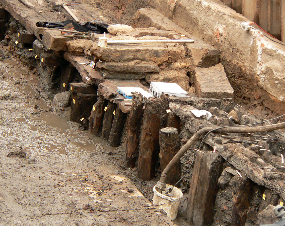 Ausgrabung auf der Leineinsel Hannover mit Fund von Holzpfählen als Uferbefestigung